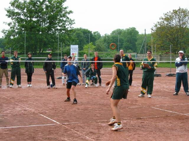 Endspiel der Damen beim International Masters 2002